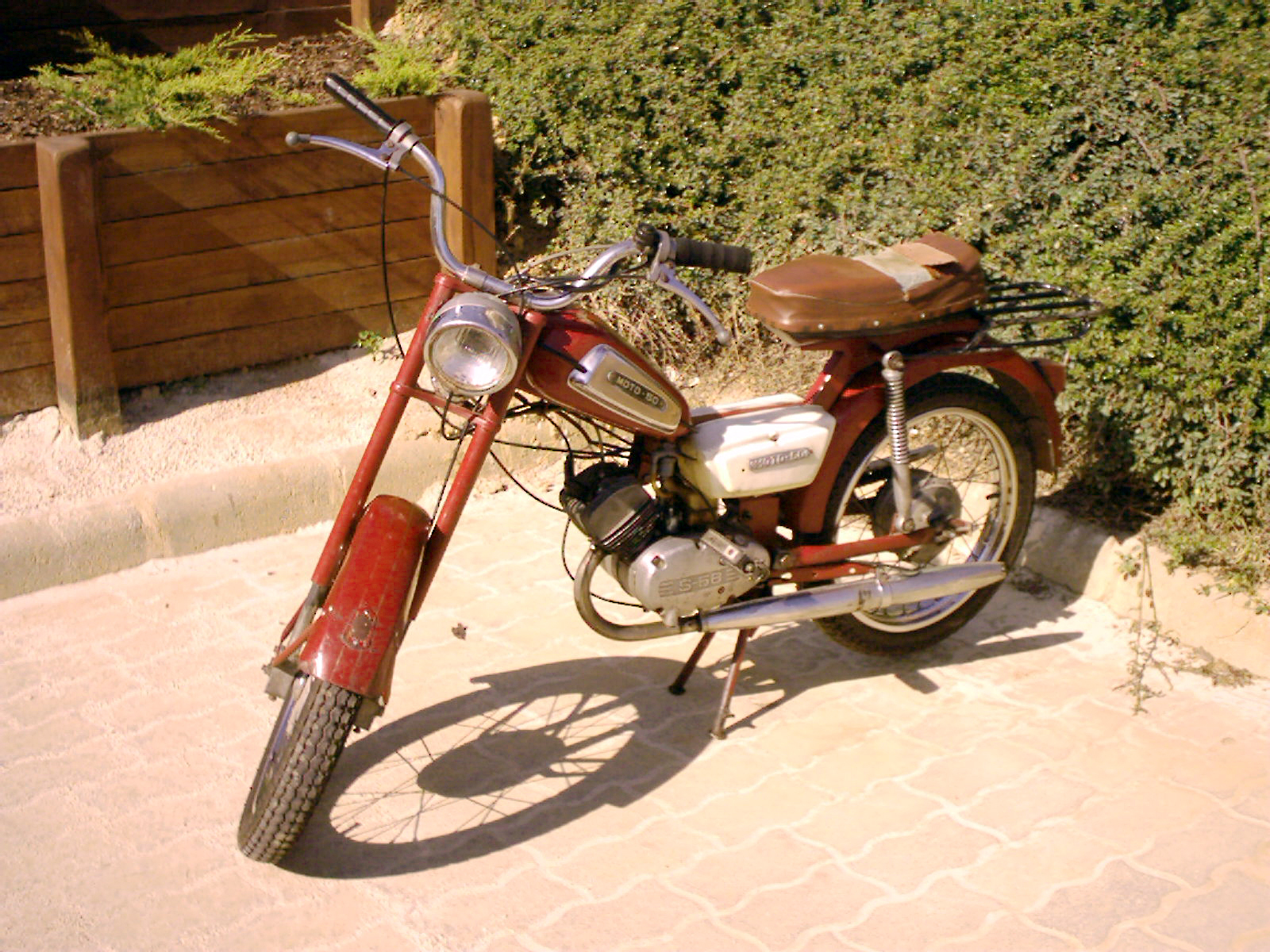 Az országban egyedülálló, exportra készült Verhovina–4 moped Veszprémben